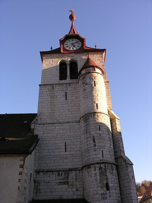 La tour frontale du Temple du Locle (date de 1525)